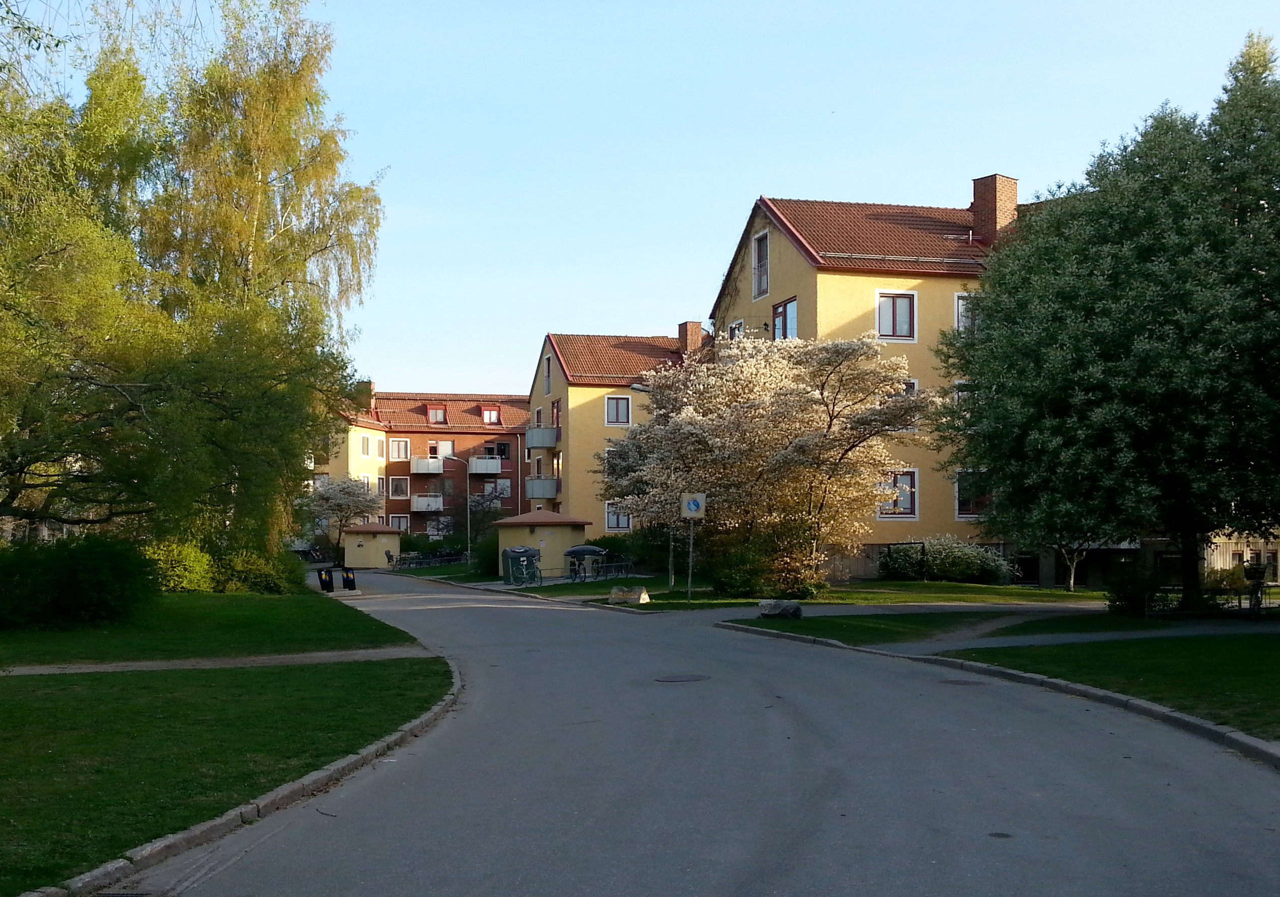 Västra Vintergatan i Rosta, en vårdag i slutet på april 2014.